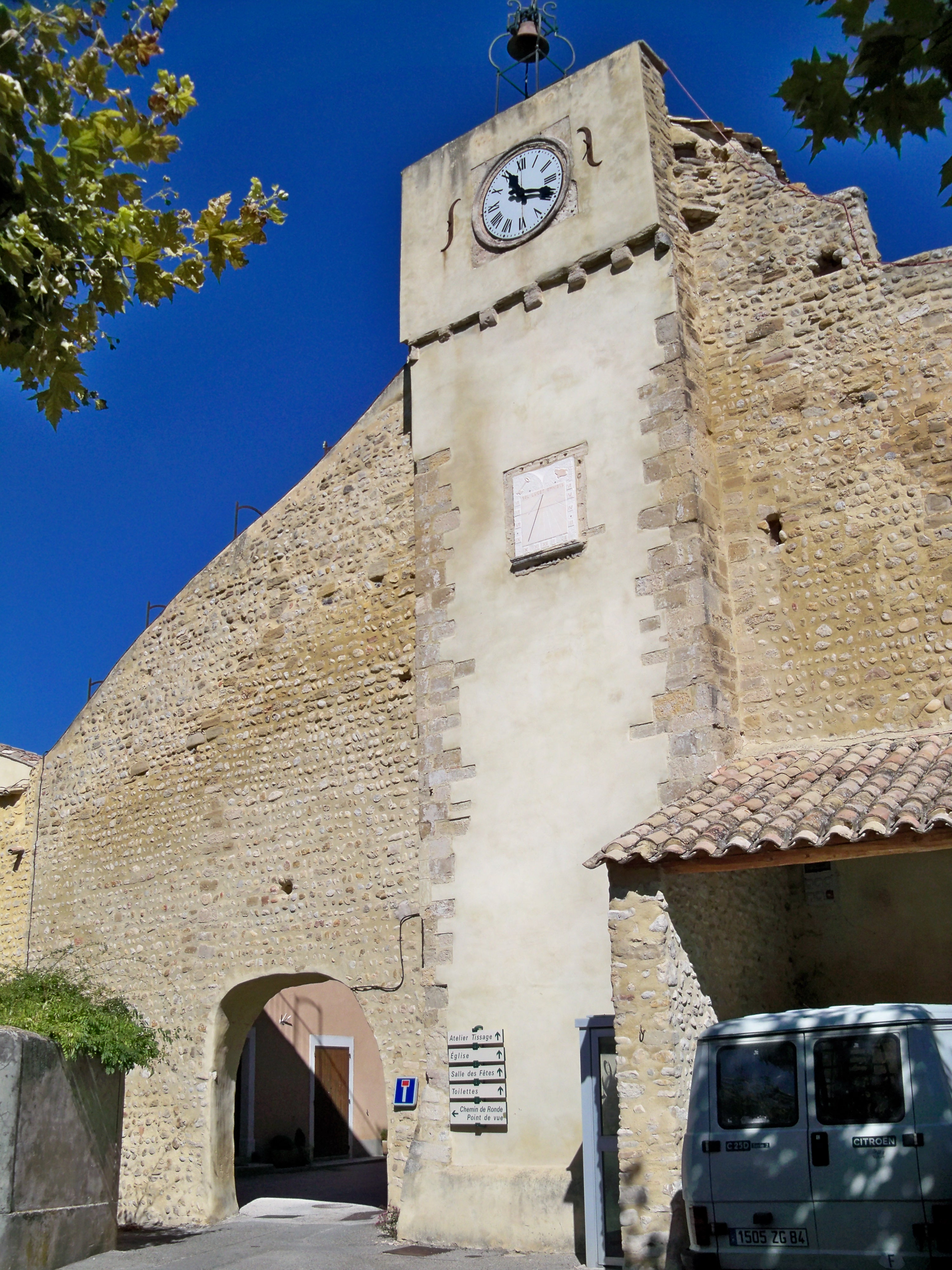 Beffroi et rempart de Buisson